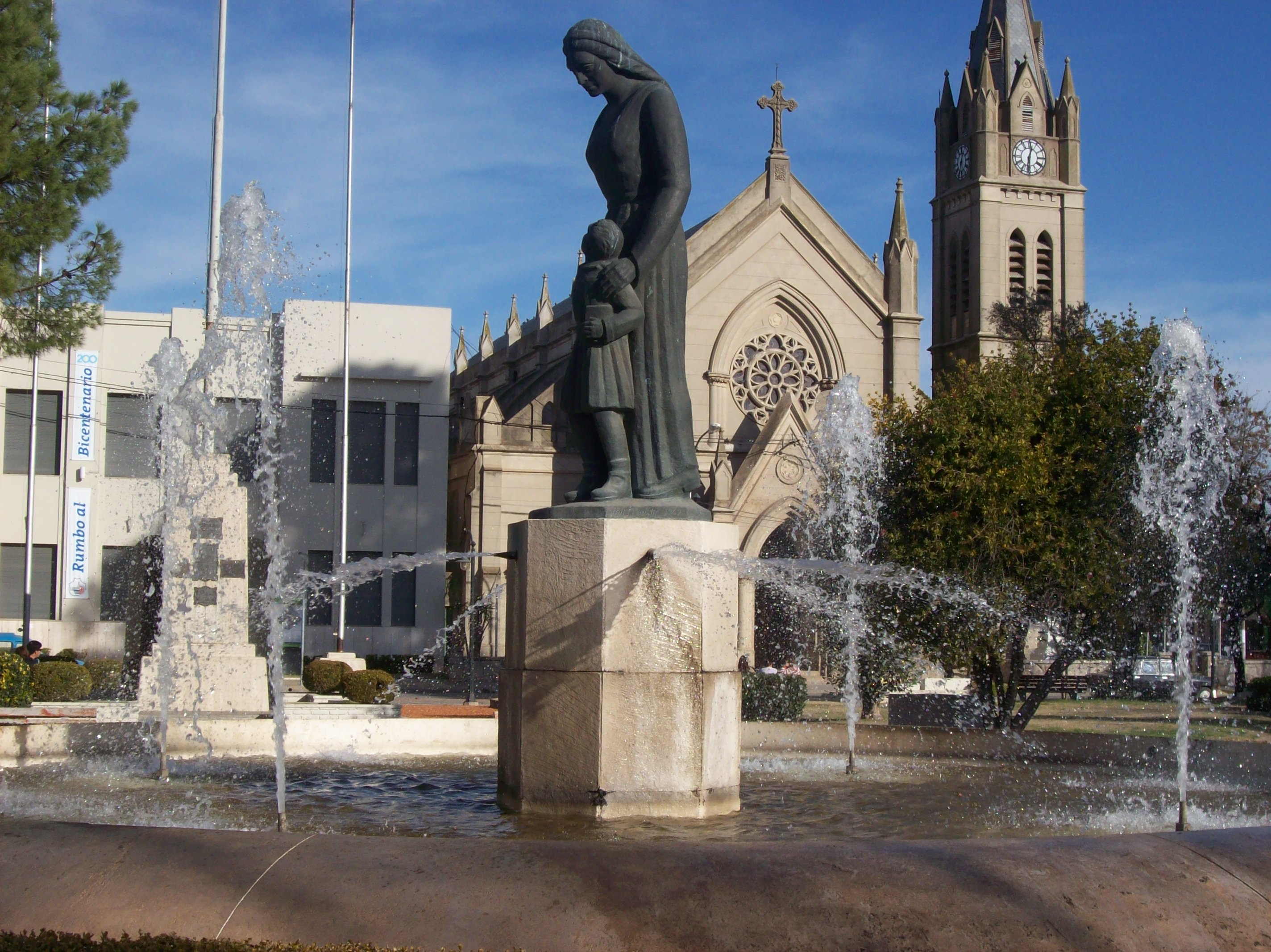 Plaza 1810 en la ciudad de Lobos, Provincia de Buenos Aires, Argentina. En primer plano se encuentra el Monumento a la Madre, al fondo, el Palacio Municipal de Lobos y la Parroquia Nuestra Señora del Carmen.